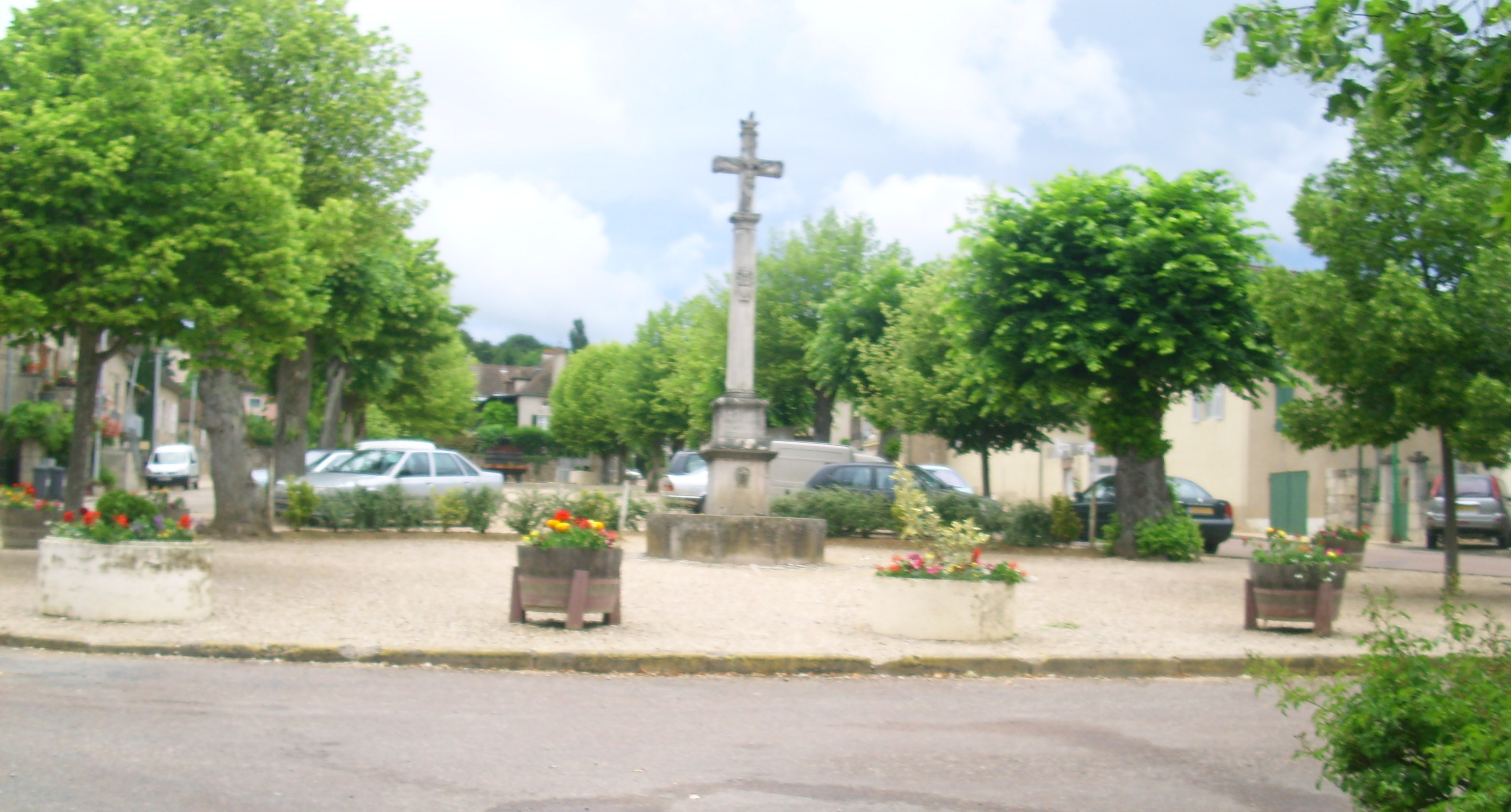 Place des Tilleuls à Saint-Jean-de-Vaux (71)